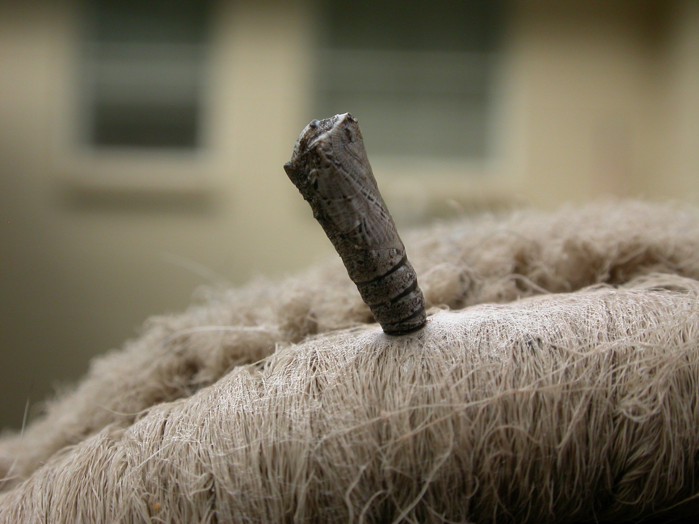 Hypertrophidae sp., pupa, Aranda, ACT, 23 December 2010